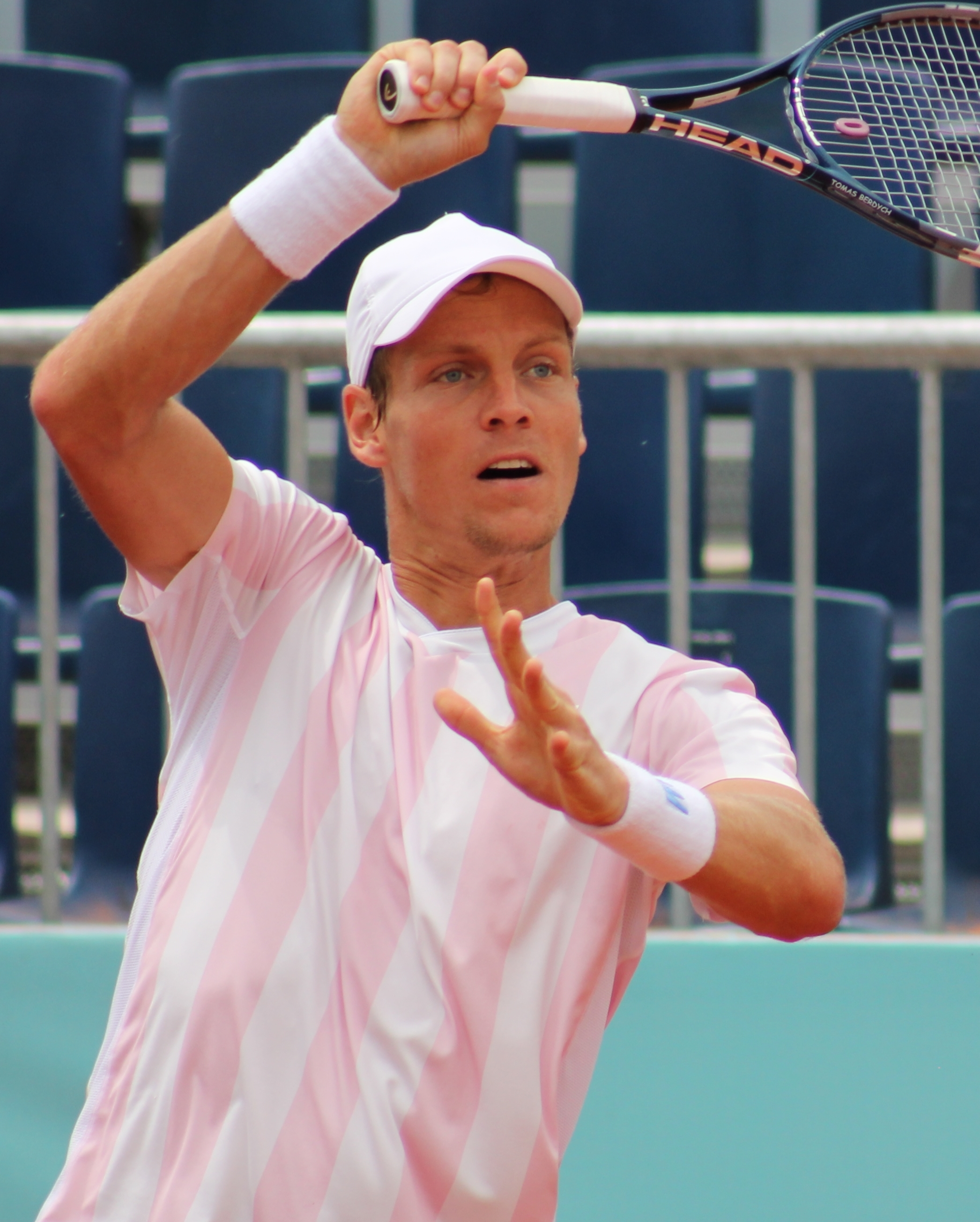 Berdych MA14 (7)